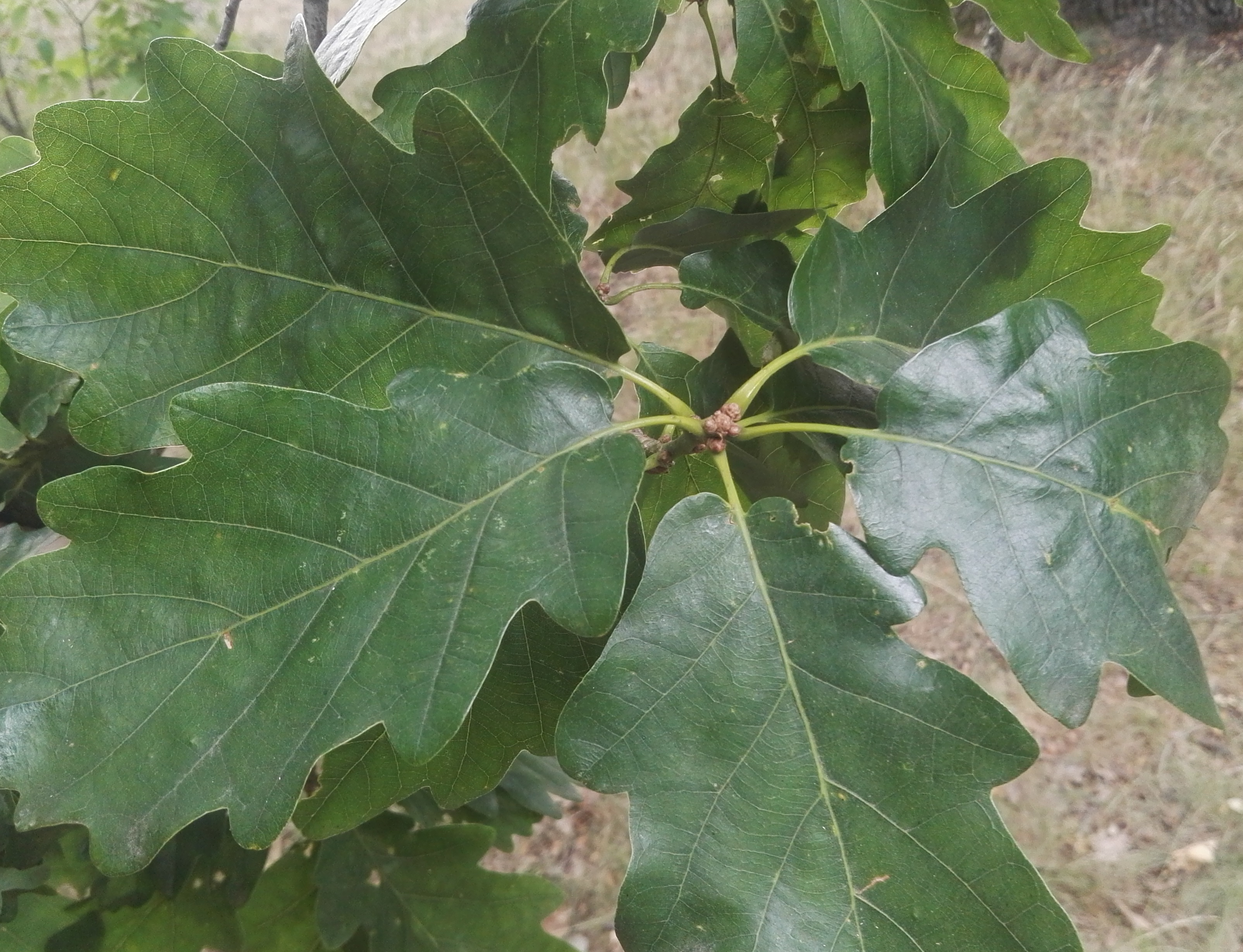 Obora Hvězda, památný dub u Libocké brány: listy v červenci 2019